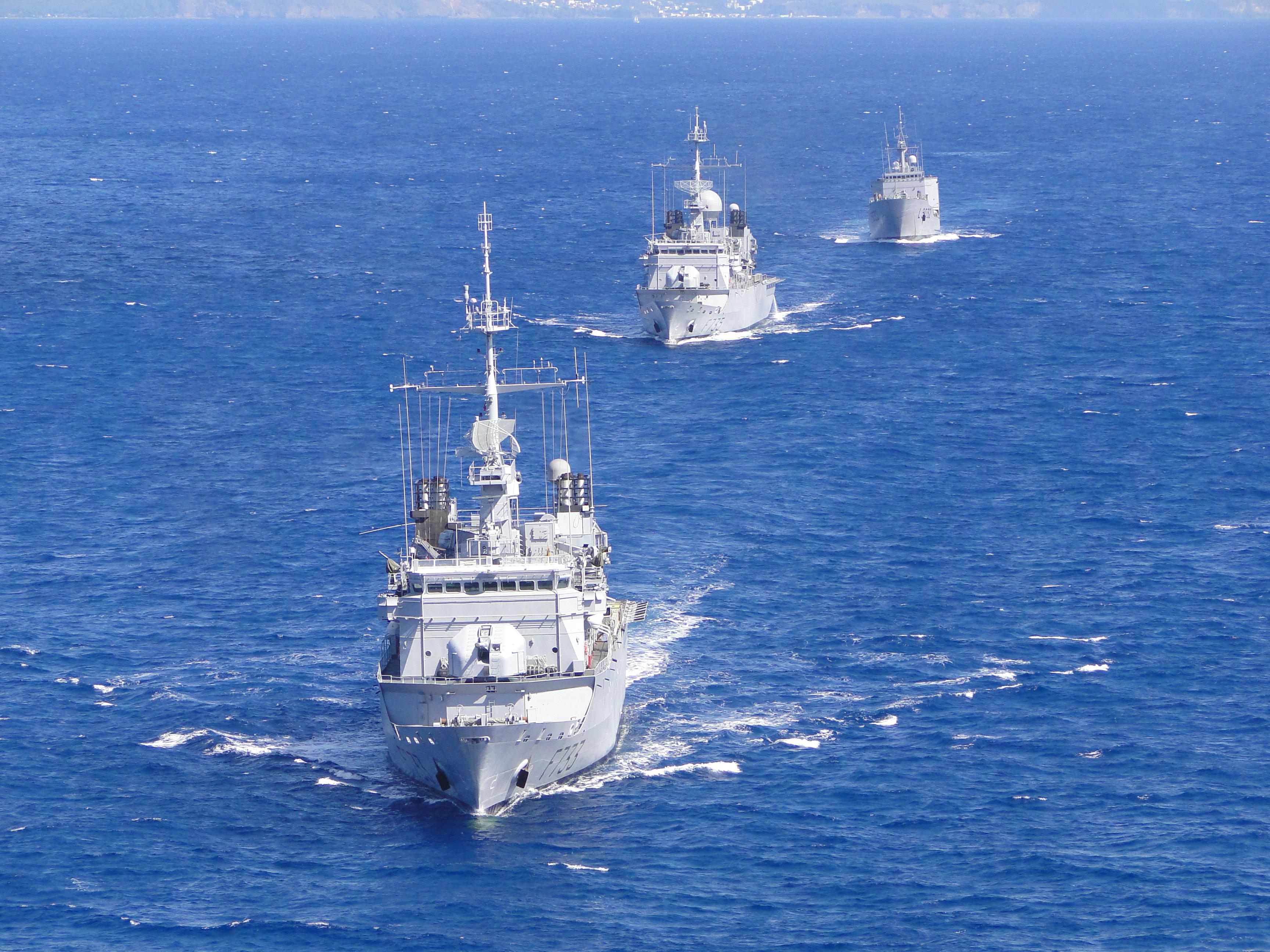 les bâtiments des Forces Armées des Antilles - Marine nationale française. Les frégates Ventôse (F733) et Germinal (F735) suivit du Dumont d'Urville (L9032).